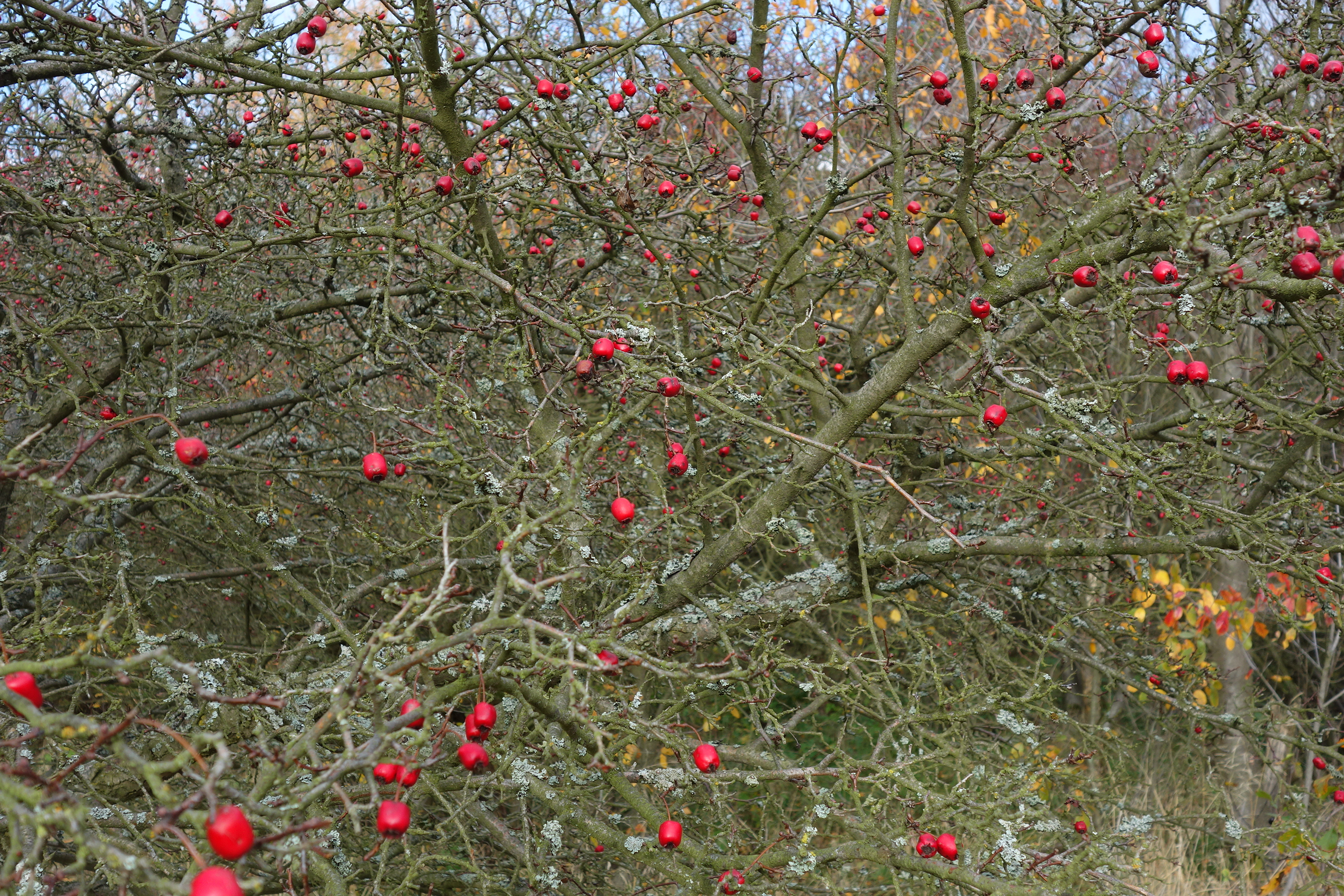 Hloh s lišejníkem